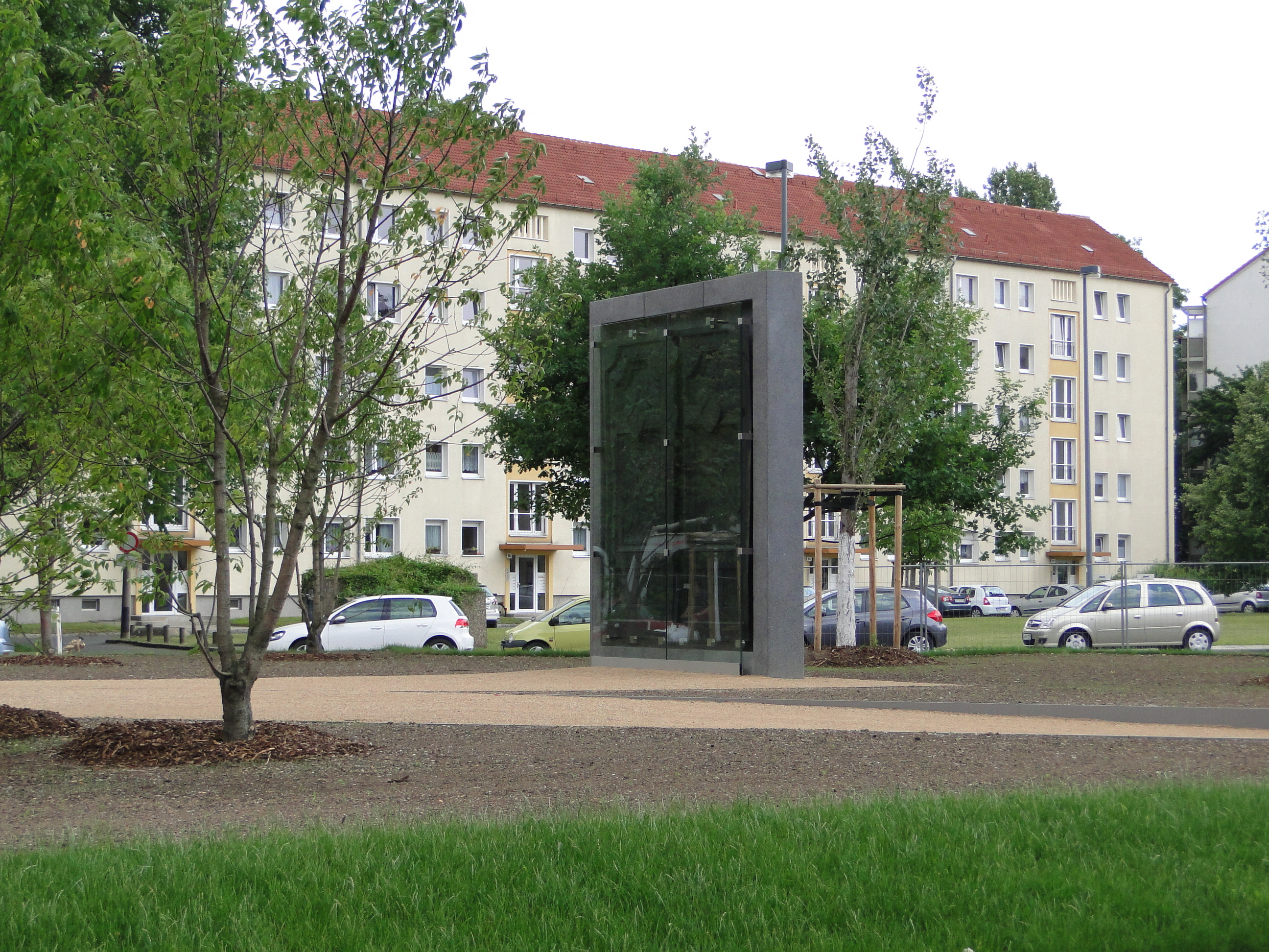 Festtagstür der zerstörten Jakobikirche in Dresden von Hans Hartmann-MacLean